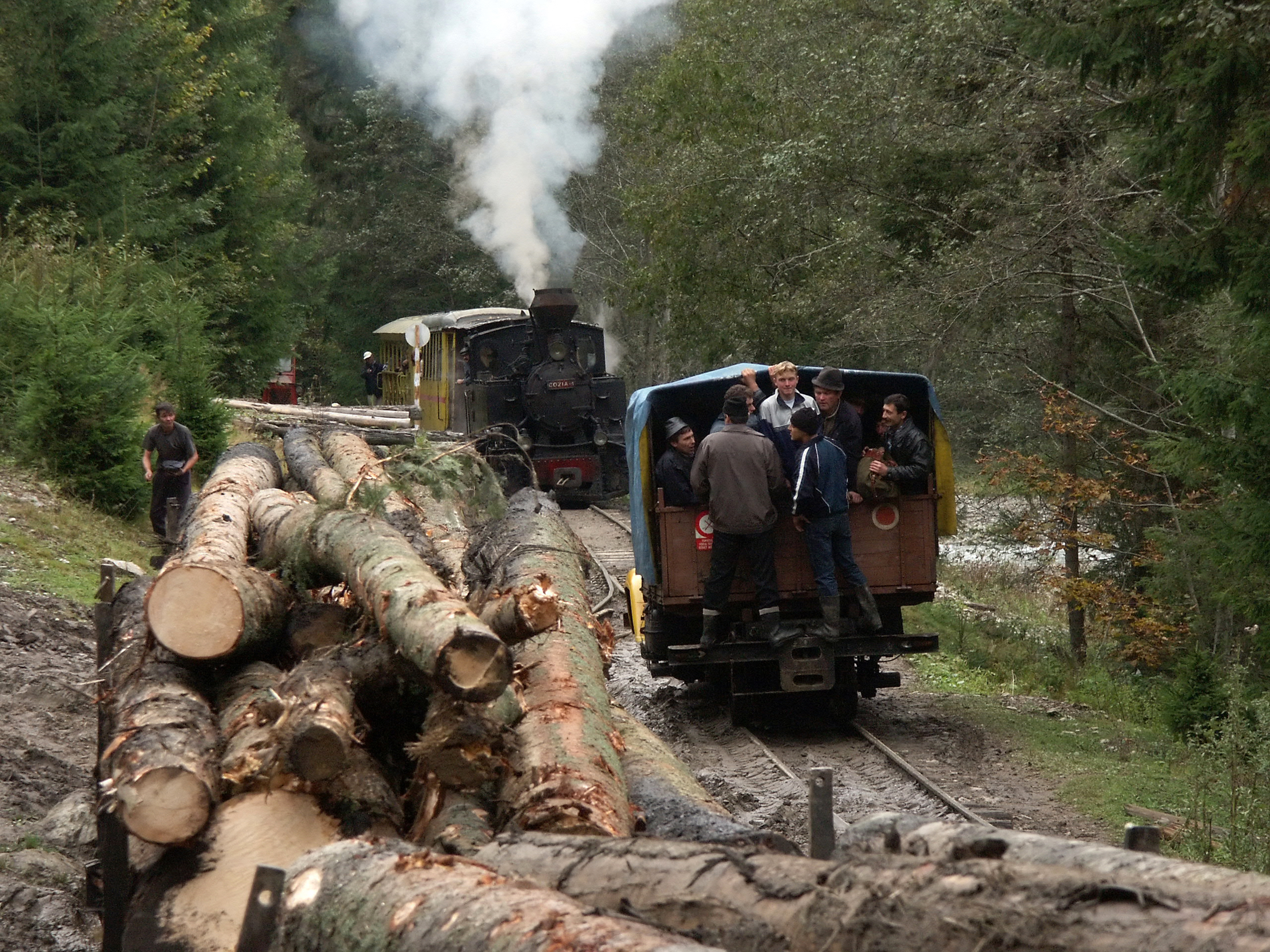 Aglomeratie pe Valea Vasserului: un camion drezina intalneste trenul de persoane